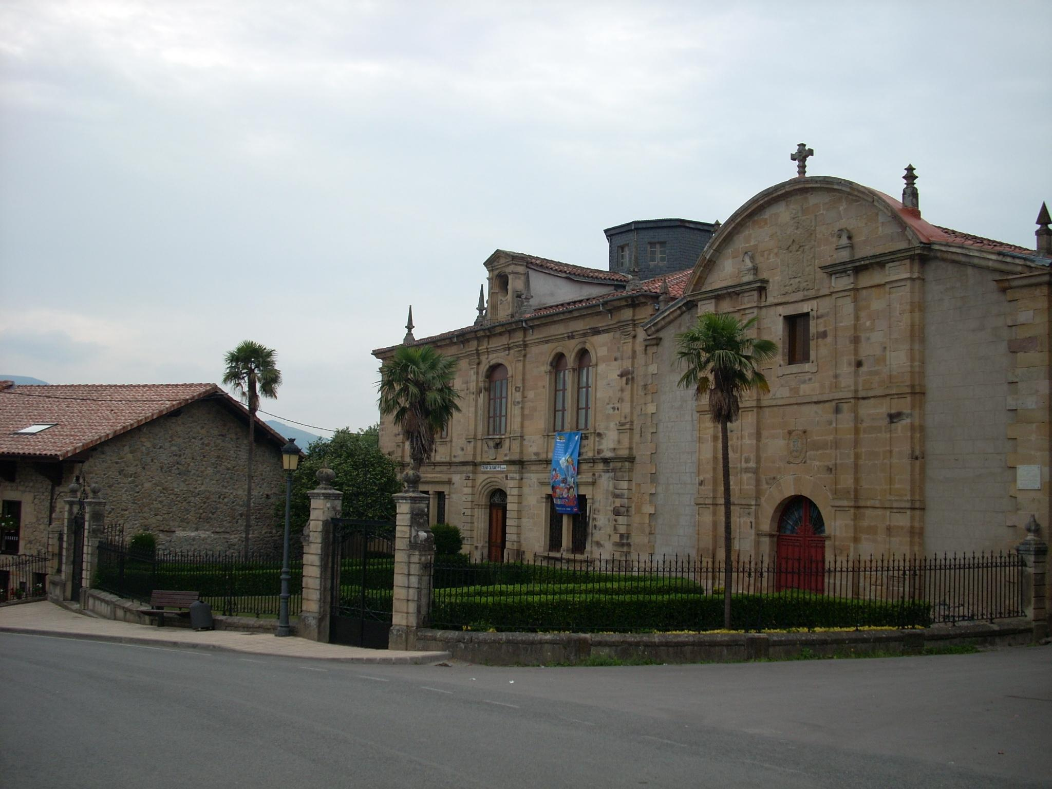 fachada principal del colegio calasanz de villacarriedo